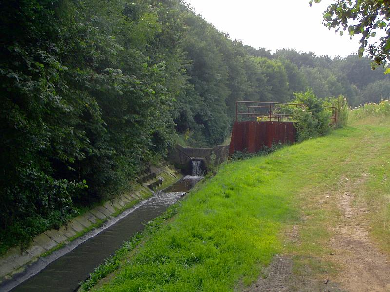 Boye: Die ersten Meter in der Betonrinne, nahe der A2